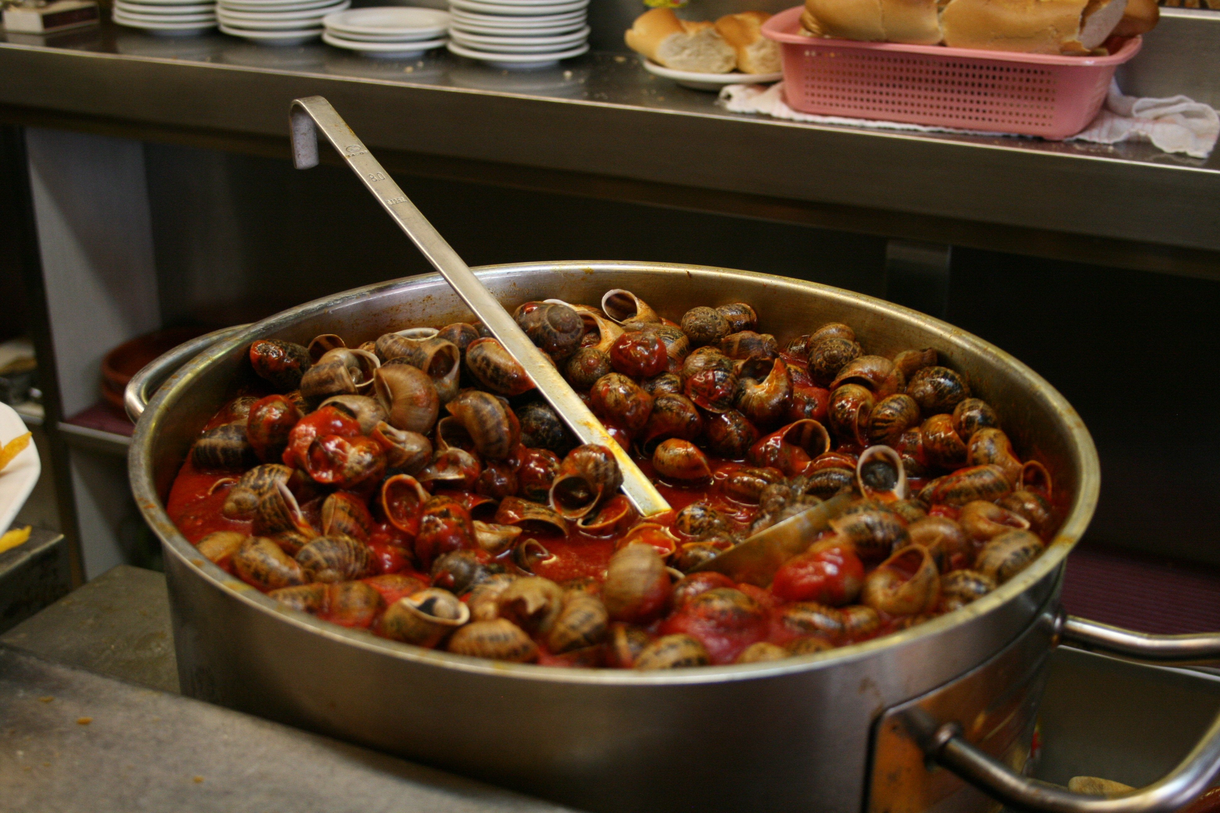 Caracoles a la Madrileña